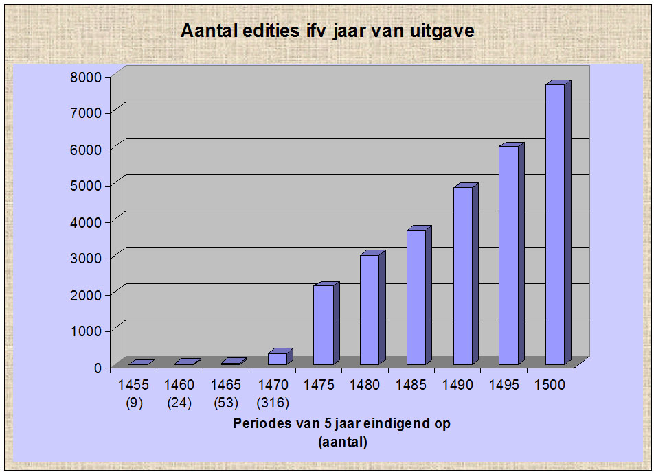 Grafiek met het aantal editities van incunabelen per periode van 5 jaar. Data uit de ISTC British Library.